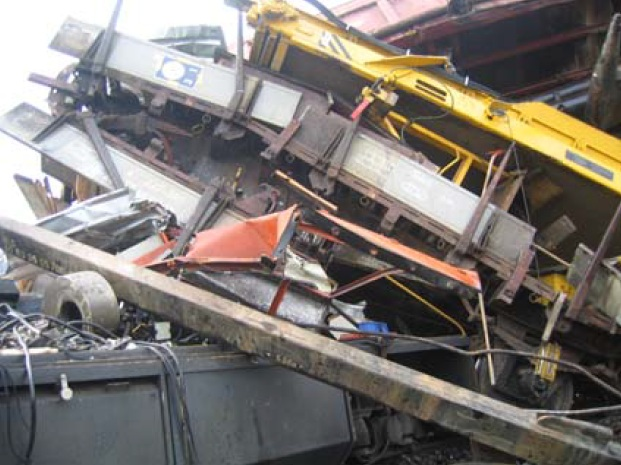 Aufprall eines Dienstzuges des BLS auf eine stehende Wagengruppe am Mittwoch, 17. Mai 2006 in in Dürrenast bei Thun.